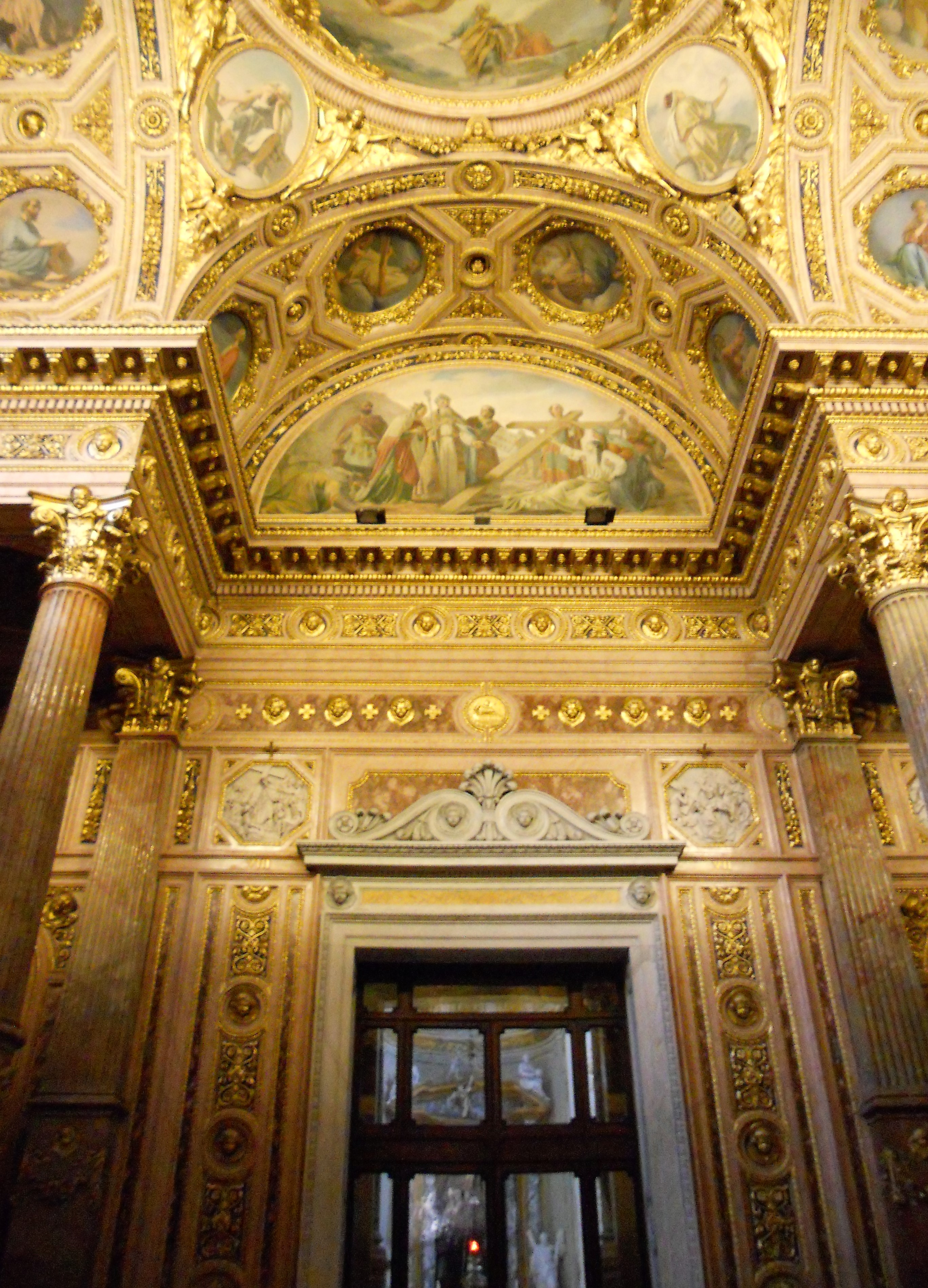 Interno della cappella dell'Eucarestia del duomo di Bergamo